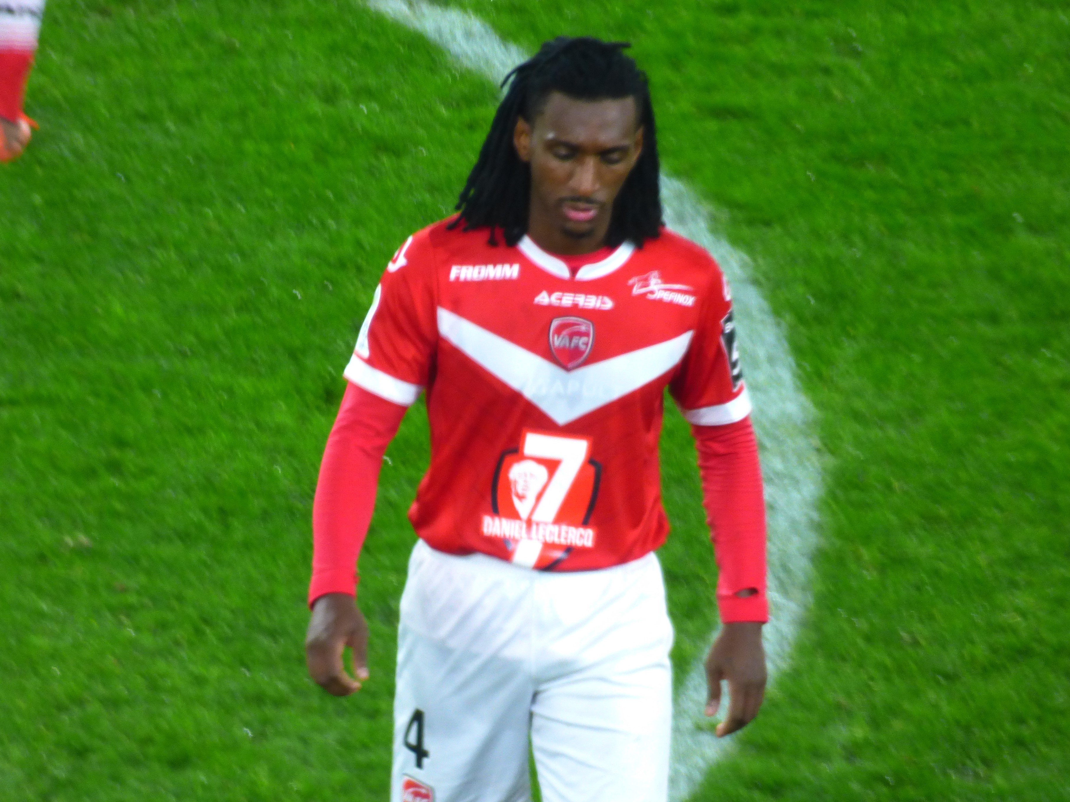 Sessi D'almeida pendant le match Valenciennes FC / RC Lens, comptant pour la seizième journée du championnat de France de football de Ligue 2 2019-2020, le 29 novembre 2019.